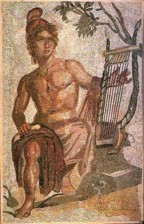 Mosaico di Orfeo da Cagliari - Museo Archelogico di Torino